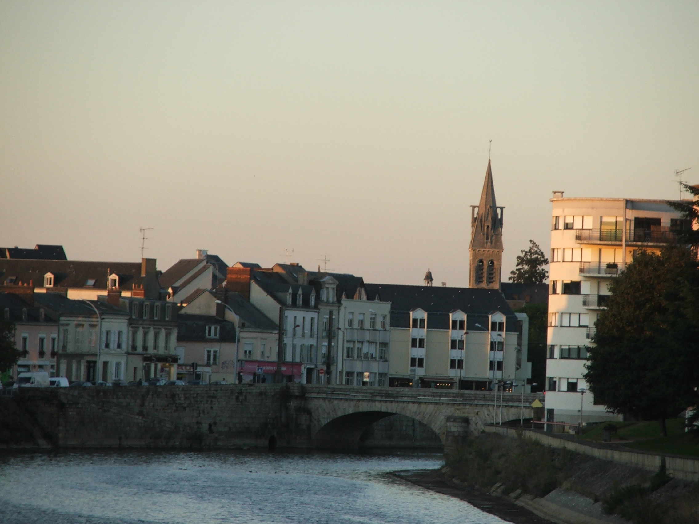 Le quartier du Pré depuis le quartier des Halles.